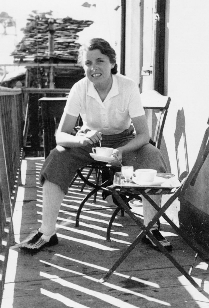 Ingeborg Kummerow in Italien mit Kaffeetasse auf Terrasse